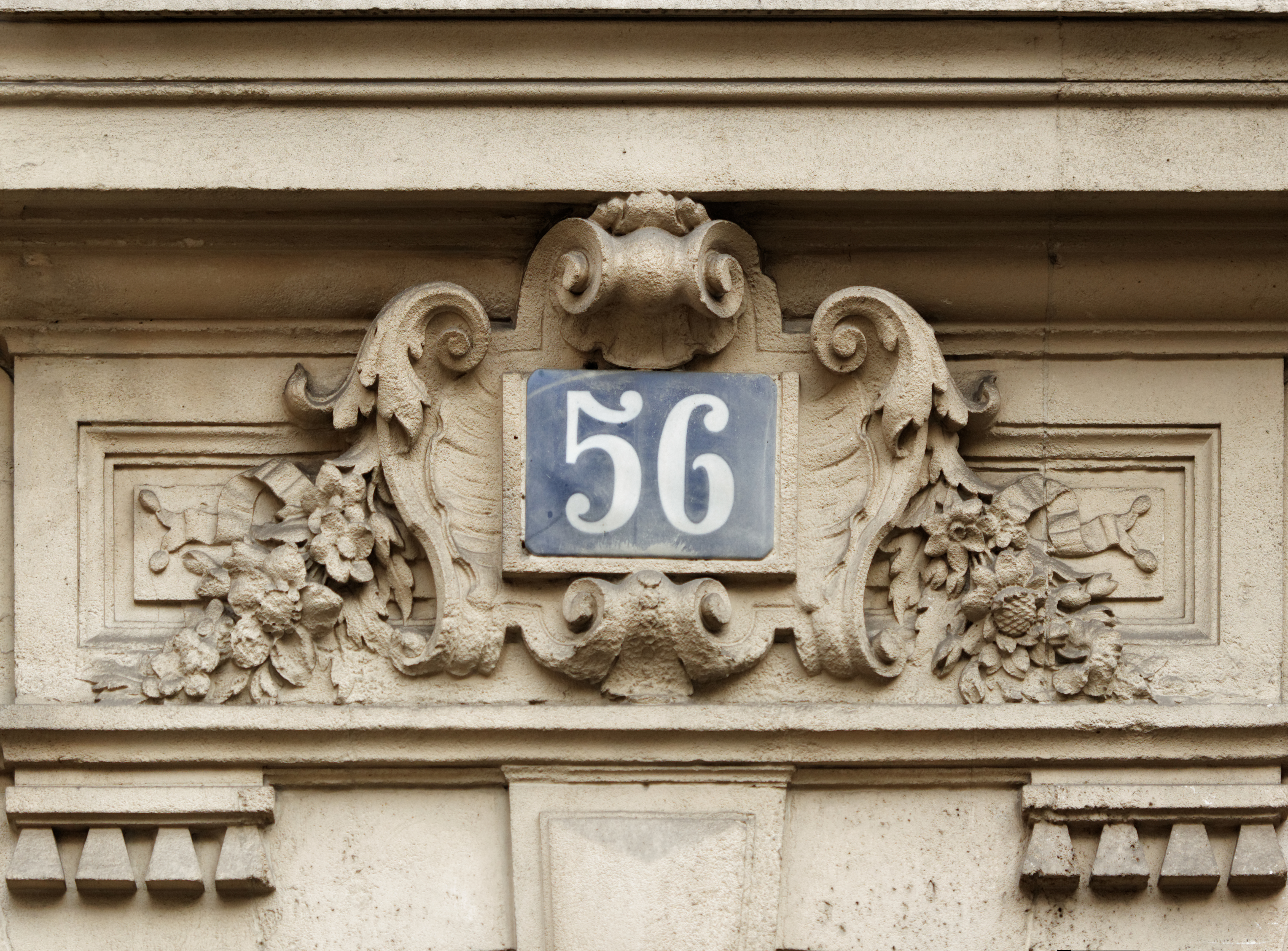 Dessus-de-porte du 56 boulevard de Magenta (Paris).